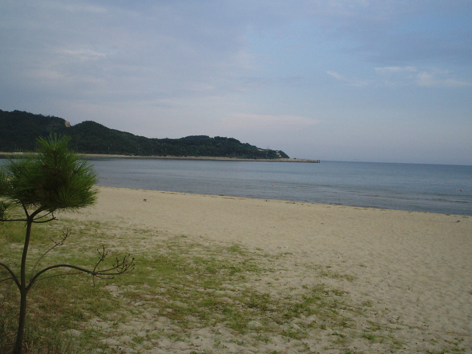 あかせビーチ春